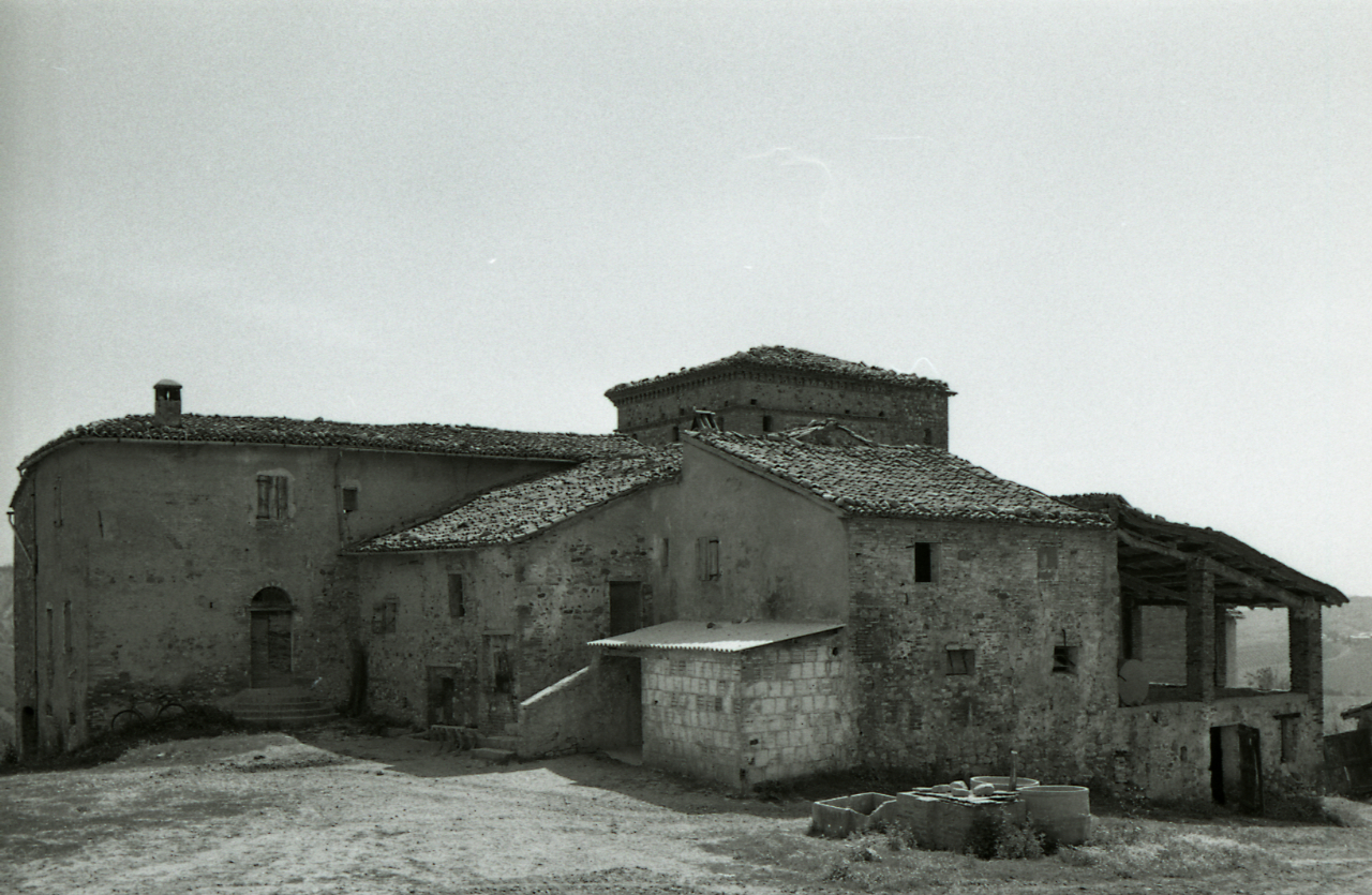 Servizio fotografico : Casalfiumanese, 1971 / Paolo Monti. - Strisce: 2, Fotogrammi complessivi: 7 : Negativo b/n, gelatina bromuro d'argento/ pellicola ; 35 mm. - ((Sul portanegativi: NIKON FP4. - Occasione: Campagna di rilevamento (quarta) della provincia di Bologna, campagna di rilevamento dell'Appenino imolese. rilevamento della Valle del Santerno. - Fonte: Agenda di Paolo Monti: Leica 1501-3000 Controllo numerazione (1950-1978), presso Archivio Paolo Monti. - Fonte: Fattura di Paolo Monti: IV. Commesse/ Fattura/ Rilevamento fotografico Valle del Santerno (1971/09/03), presso Archivio Paolo Monti. 140 riprese fotografiche con 60 varianti; 235 stampe formato 18x24, 28 stampe formato 50x65 per Mostra Imola